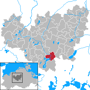 Kuchelmiß in Mecklenburg-Vorpommern - District Güstrow